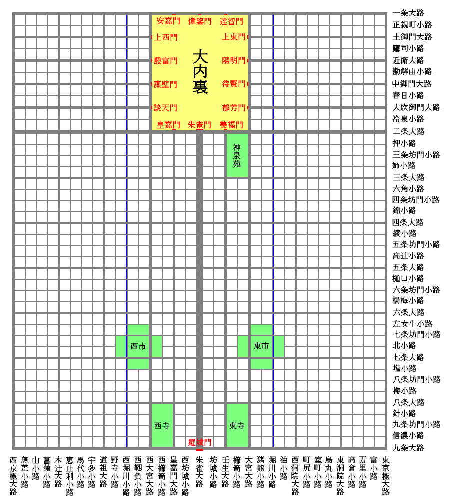 平安京の全体図。投稿者作成。複数の町にまたがる邸宅などがあるため、小路は途切れていることがある。